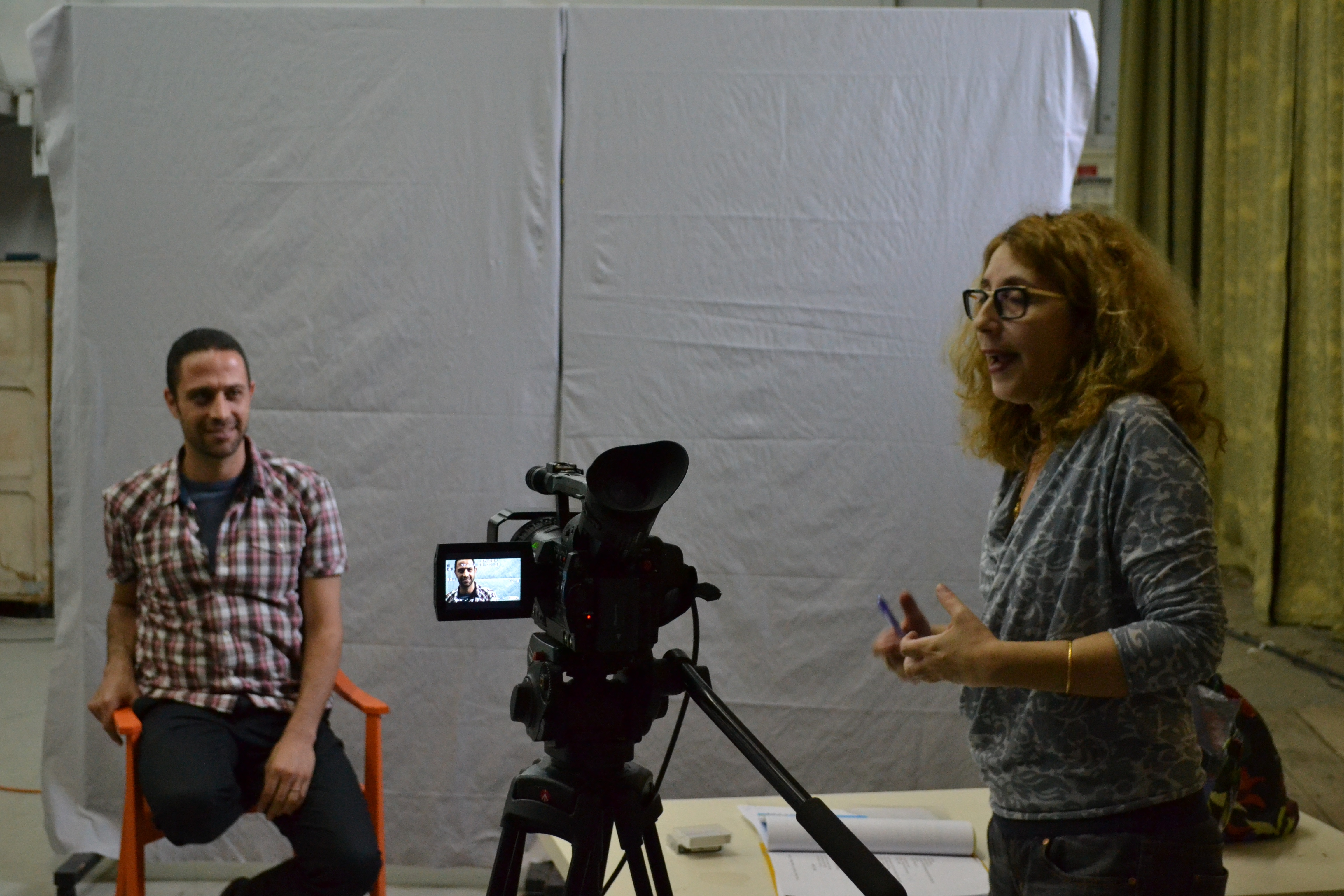 אורית אזולאי מעבירה קורס בסדנאות הבמה